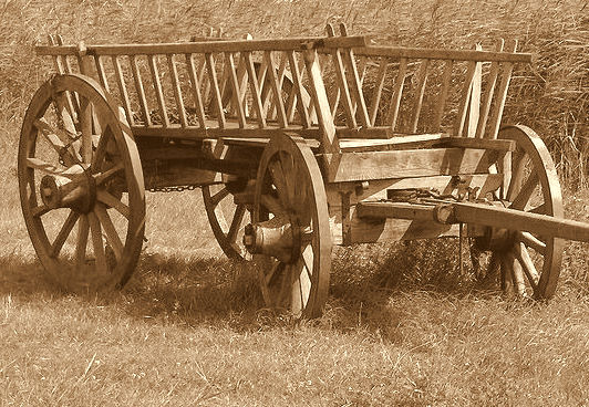 Alter Heuwagen